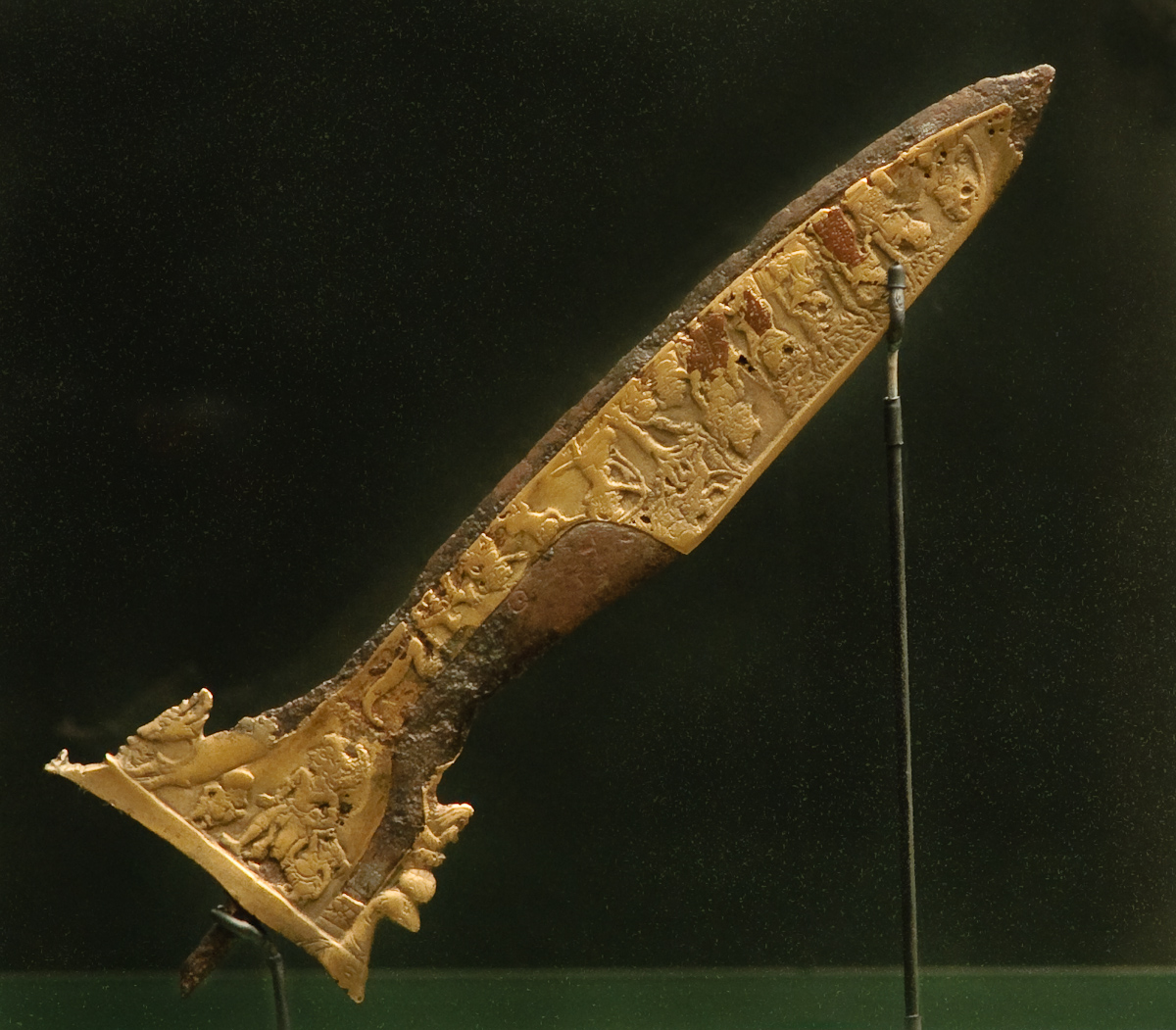 Kris Van Knaud (6046-1) kris van Knaud